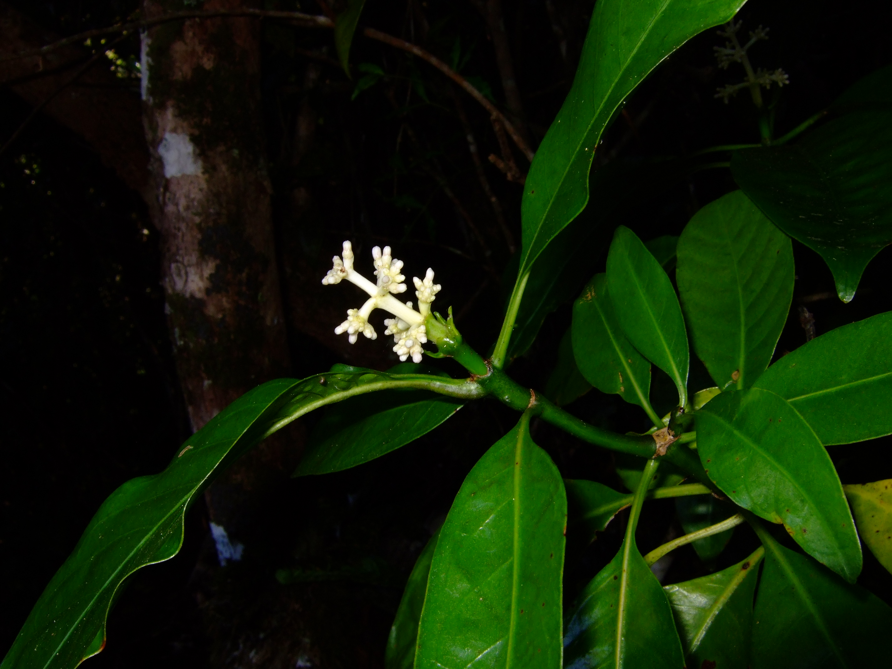 photo prise à Mafate (canalisation Augustave) ile de la Réunion